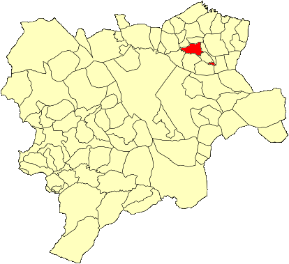 Mapa municipal de Albacete con el municipio de Jorquera resaltado en rojo.